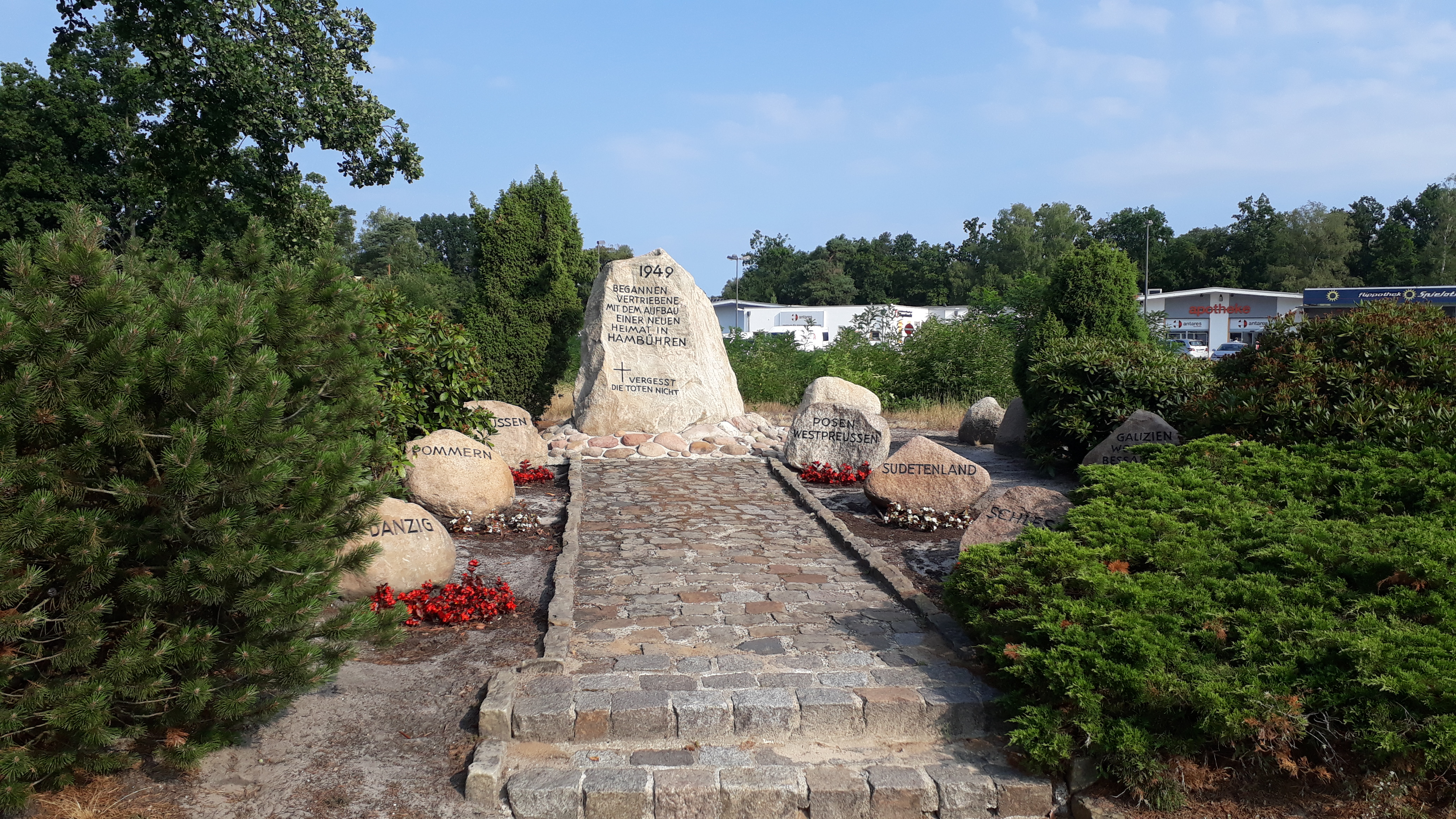 Hambühren. Vertriebenendenkmal in der Ostlandstraße. Wegsteine Danzig, Pommern, Preußen, Posen, Westpreußen, Sudetenland, Schlesien. 1949 begannen Vertriebene mit dem Aufbau einer neuen Heimat in Hambühren. Vergesst die Toten nicht.